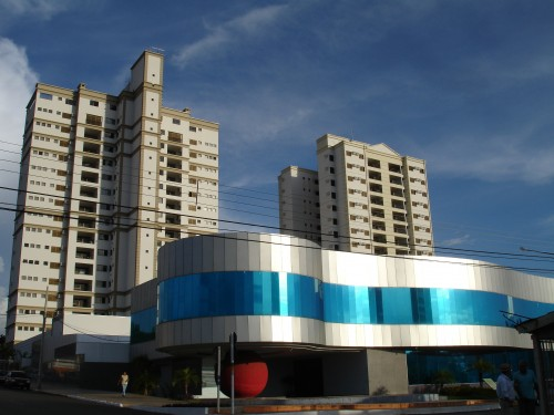 Prefeitura